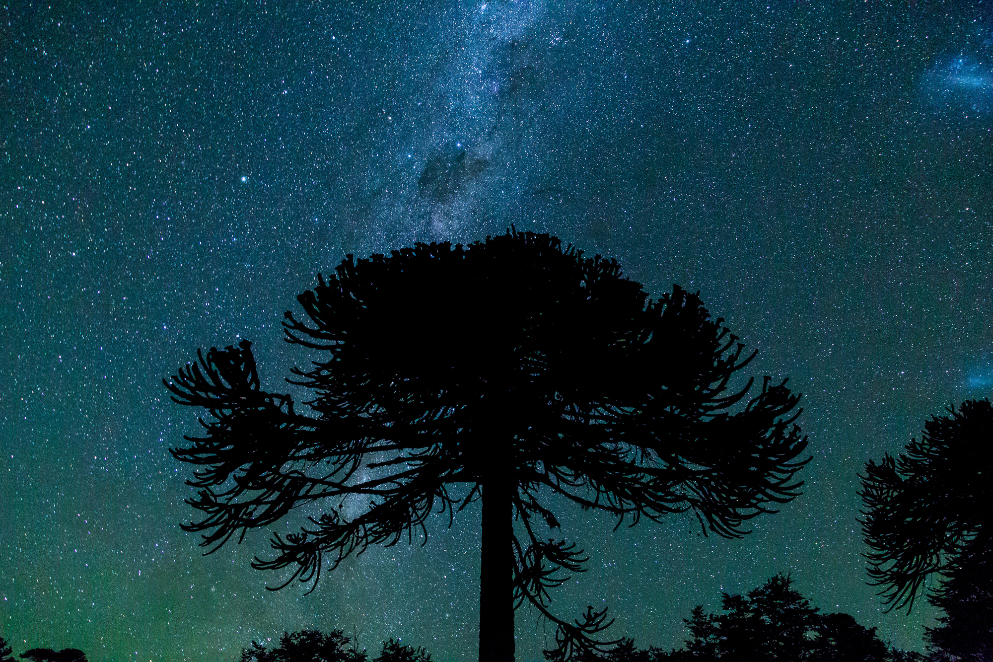 Araucaria de noche en el Parque nacional Conguillío